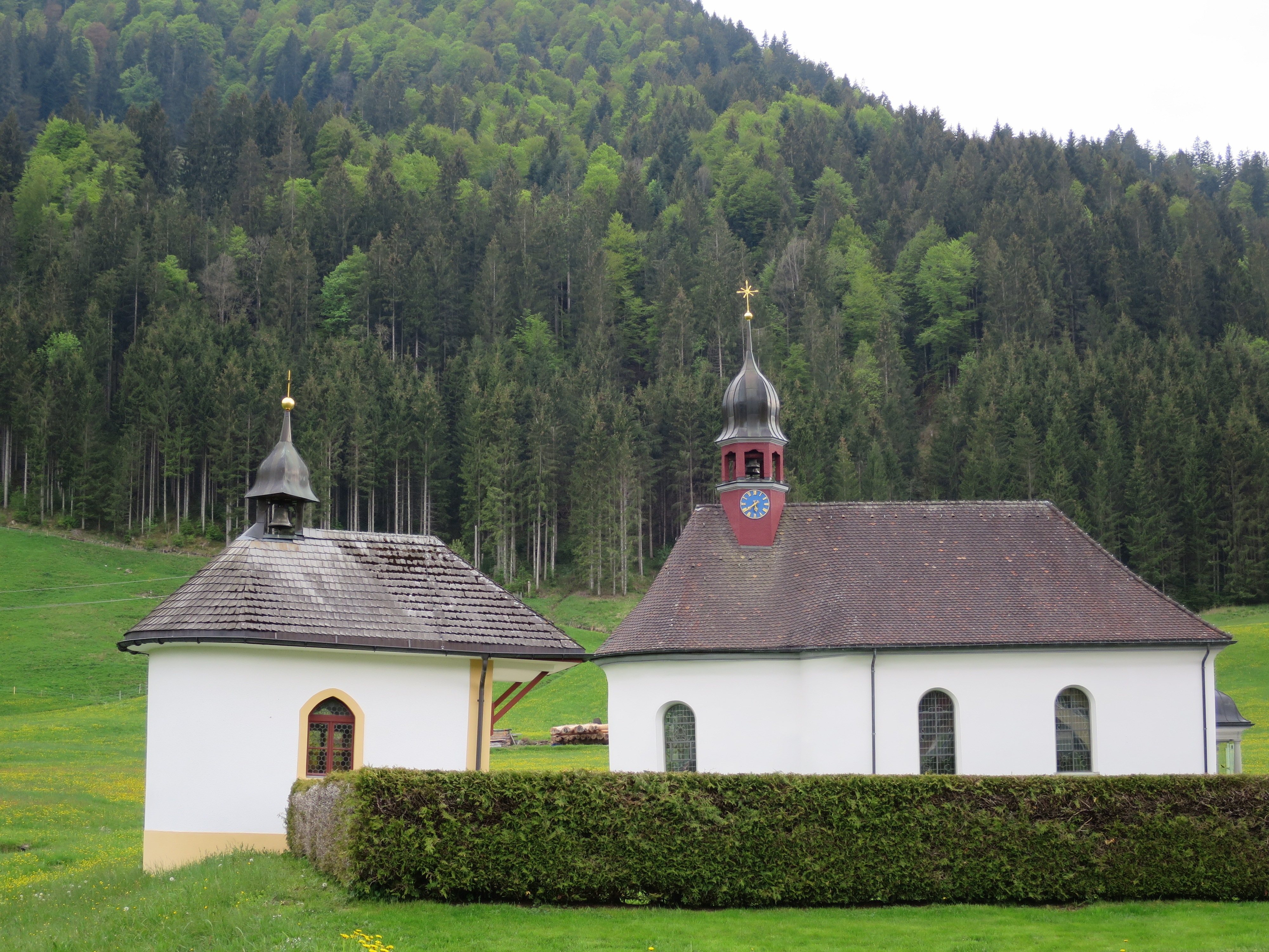 Kapelle Studen